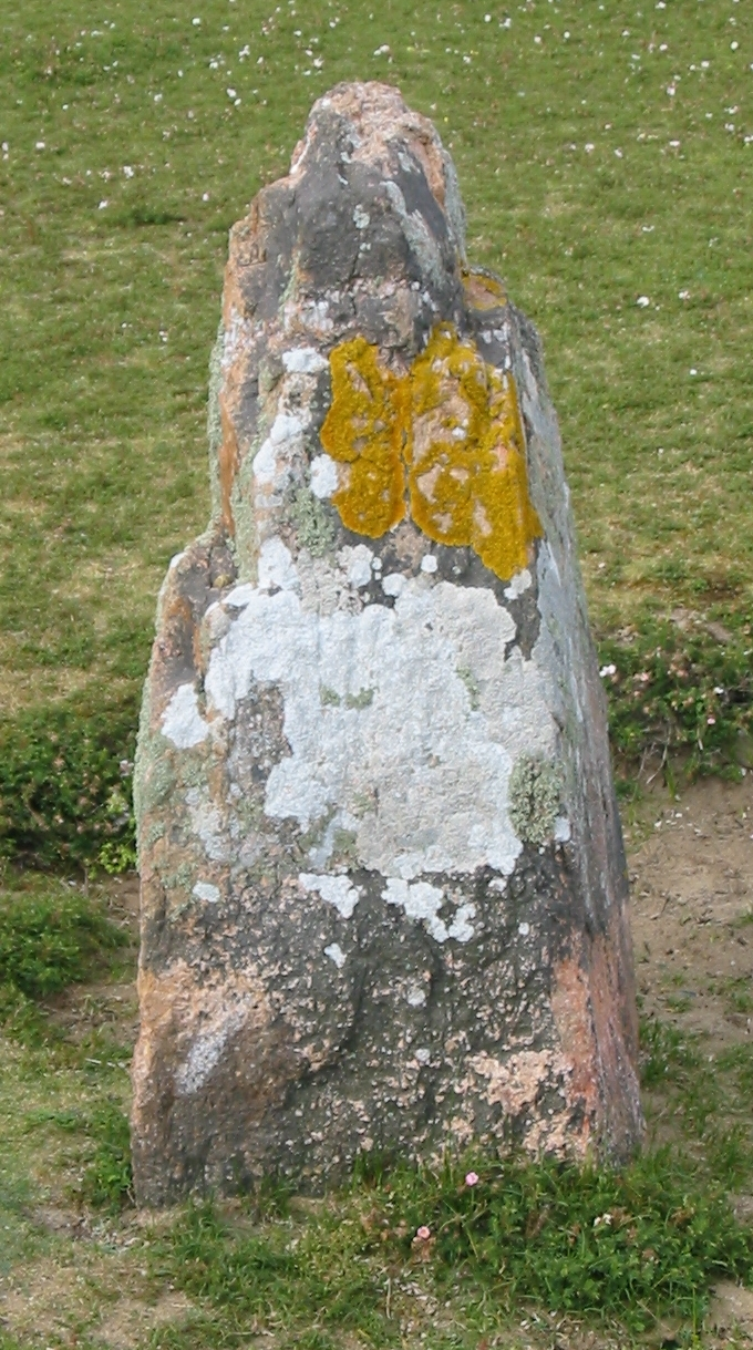 Nrf: Ès Blianches Banques, Jèrri, Juîn 2009